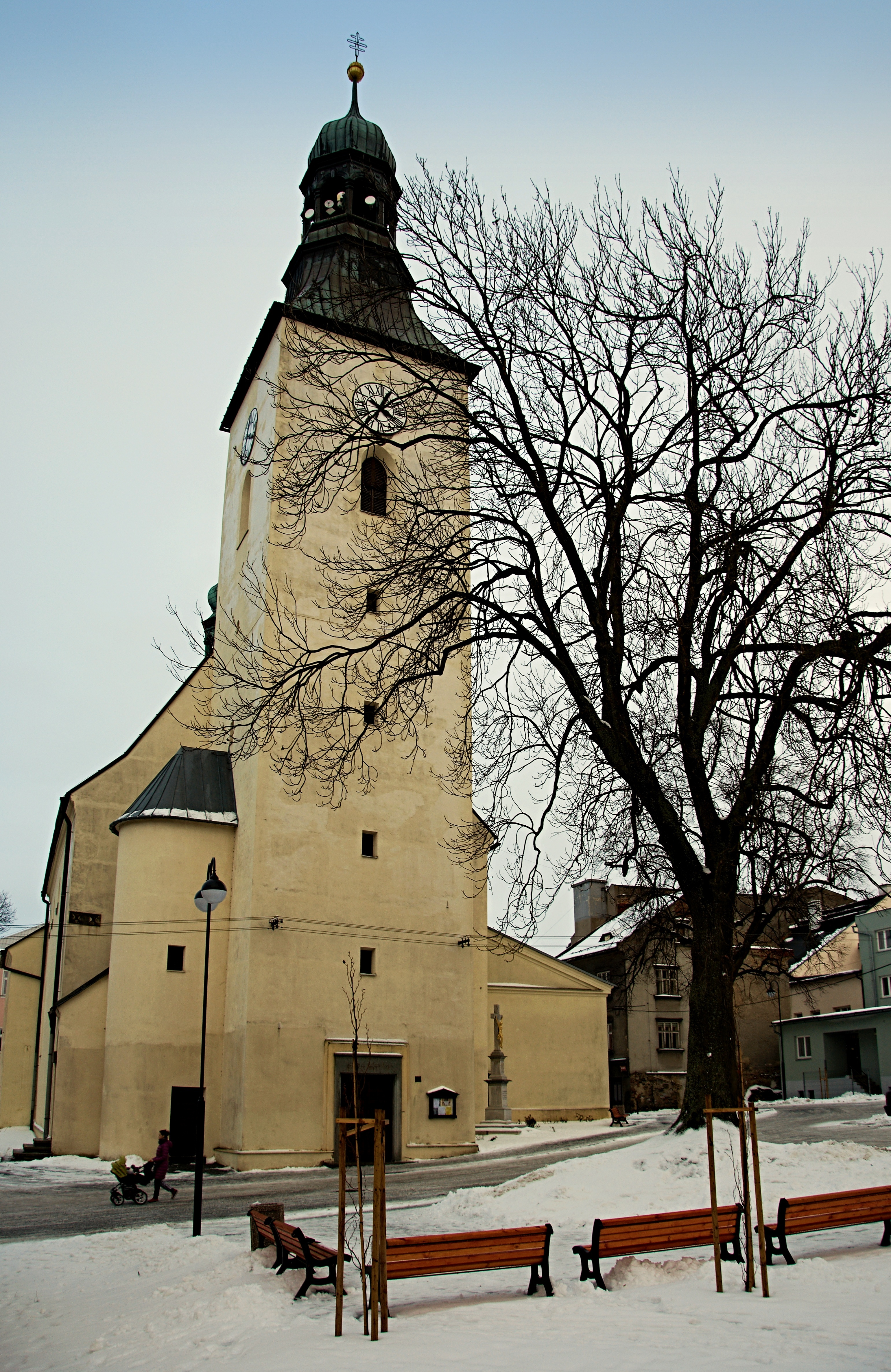 Věž kostela svatého Michaela v Rýmařově